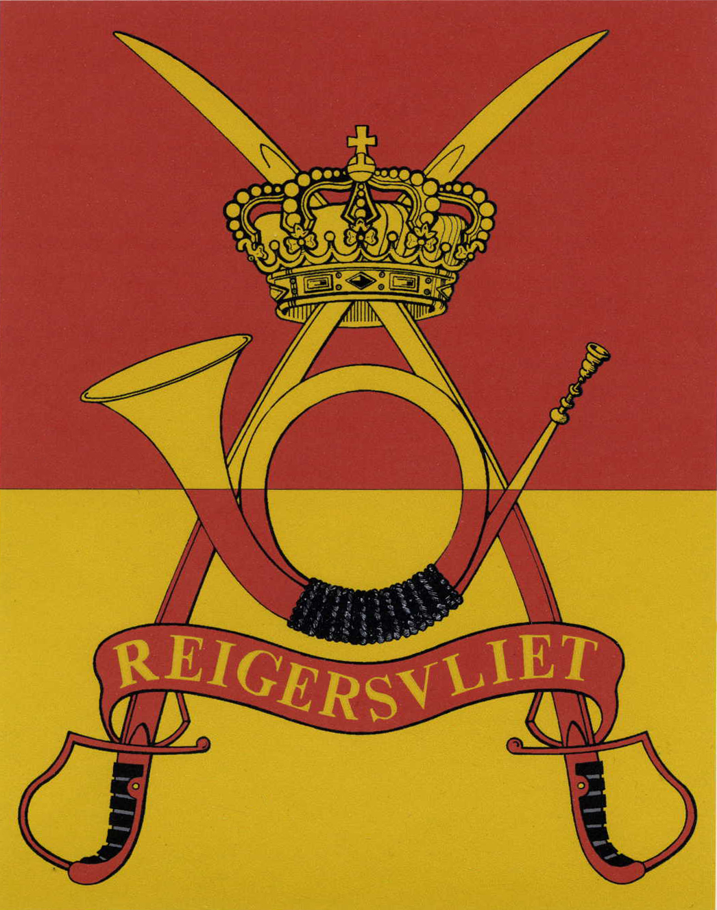 Drapeau du Régiment du 2/4 Chasseurs à Cheval.